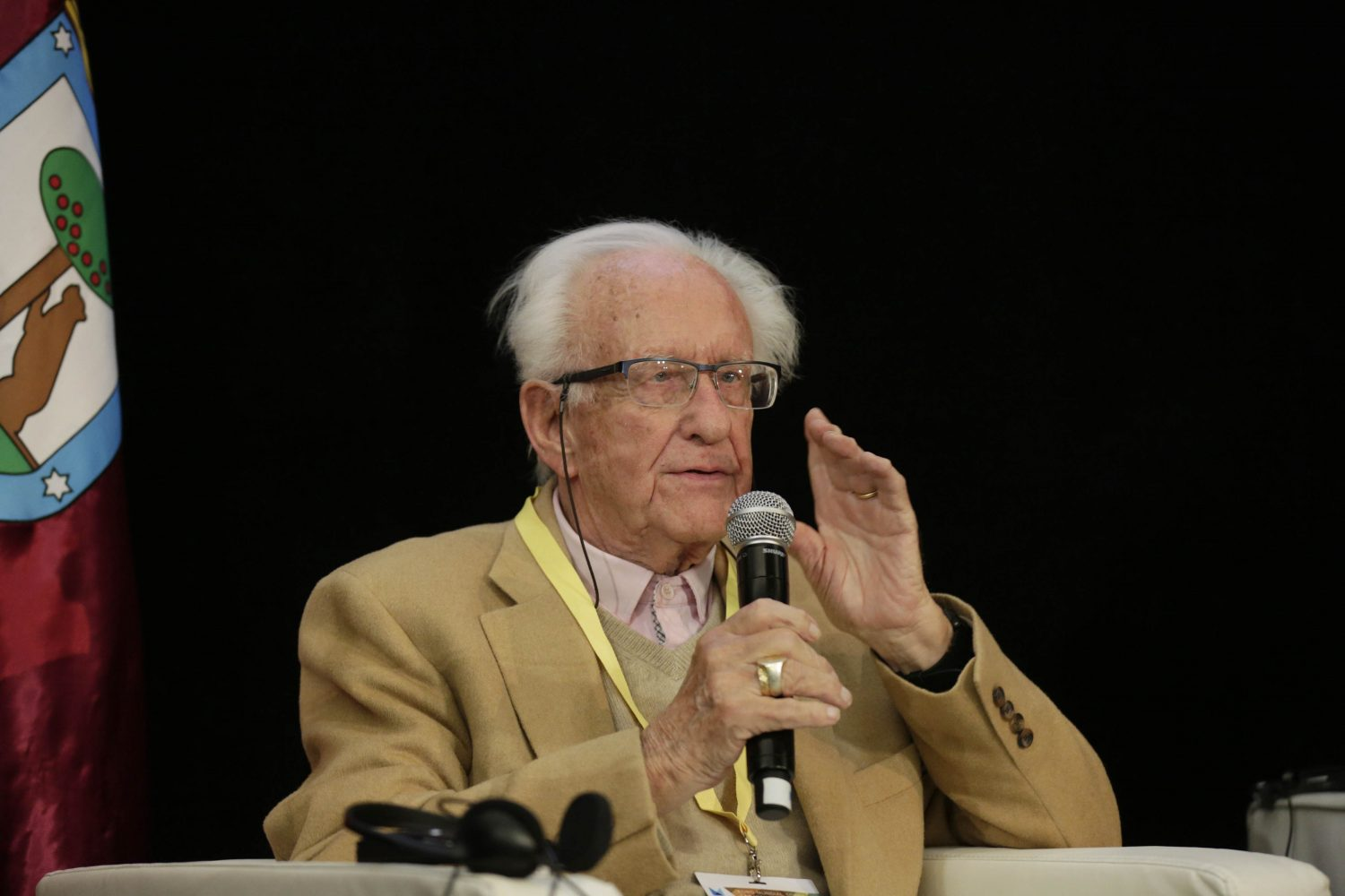 Ciudades con nombres de calles que rememoren hechos históricos o héroes pacíficos; estatuas y monumentos que muestren familias y no guerreros a caballo en una batalla; medios de comunicación que investiguen sobre las causas de la falta de paz en la sociedad y no sólo sobre los hechos de violencia. Así ha descrito el sociólogo y matemático noruego, Johan Galtung, el escenario de lo que debiera ser una ciudad gobernada para la paz. Lo ha hecho en la sesión plenaria relacionada con este tema dentro del I Foro Mundial sobre Violencias Urbanas y Educación para la Convivencia y la Paz. En palabras del investigador noruego, crear núcleos urbanos pacíficos es una cuestión de voluntad. “La construcción de ciudades de paz no es un problema de recursos. Es un problema de voluntad”.